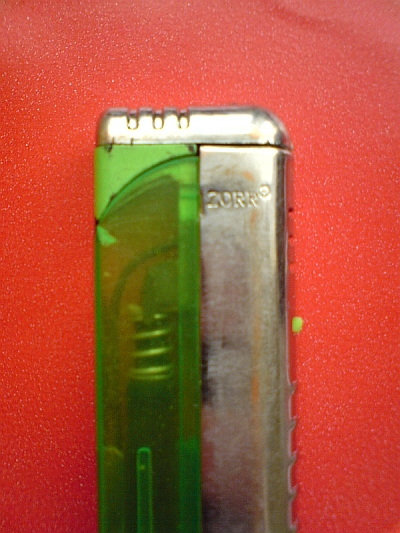 Taki może być przykładowy wygląd zapalniczki żarowej.